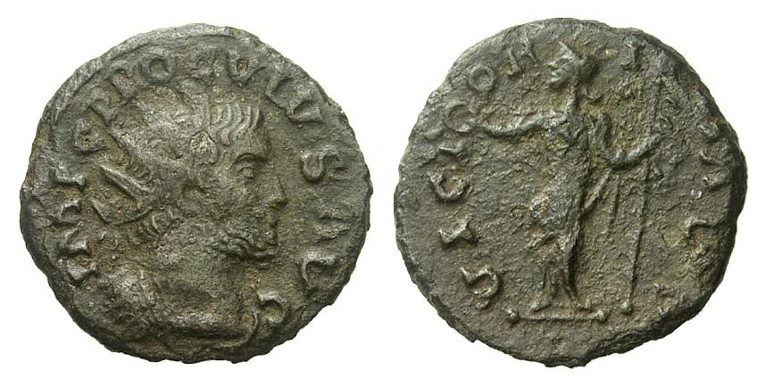 IMP C PROCVLVS AVG, gepanzerte Büste mit Strahlenkrone nach rechts. Rs: VICT-OR-I-A AVG, Victoria mit Kranz und Zepter en face stehend, Kopf nach links. RIC -; D. Vagi, Coinage and History of the Roman Empire, 2470; H. Aufhäuser, Auktion 8, 1991, Nr. 640 (heute in der Staatlichen Münzsammlung München, stempelgleich). Zweites bekanntes Exemplar. Ex Dix Noonan Webb, Auktion 10.4.2013, Nr. 694. Die Münze wurde am 7.11.2012 von Mark Hildreth und Colin Popplewell in einem Feld in der Nähe von Stamford Bridge in East Yorkshire/England gefunden.